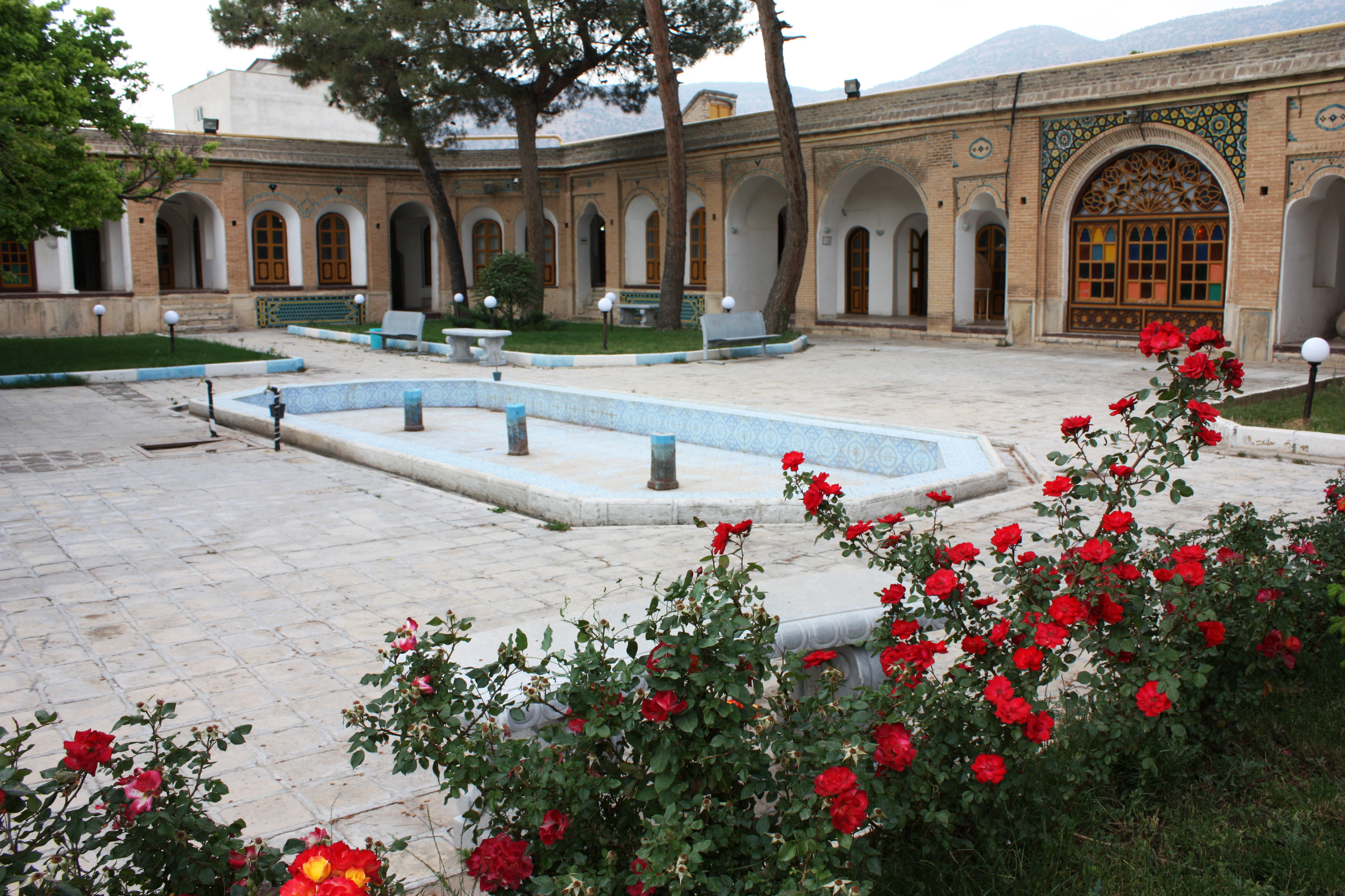 قلعه والی ایلام